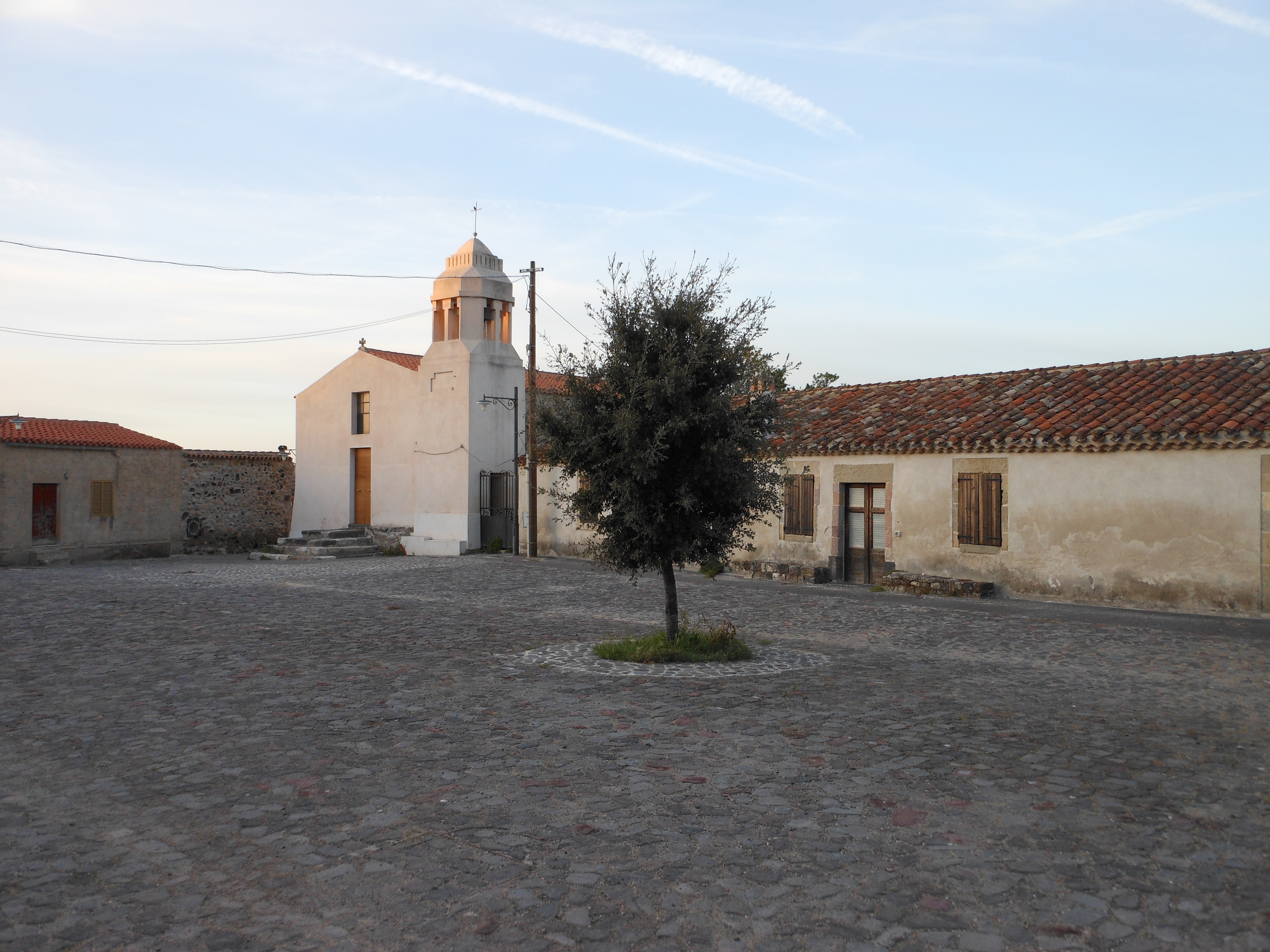 Chiesa di Santa Giulia, risalente al XII secolo.